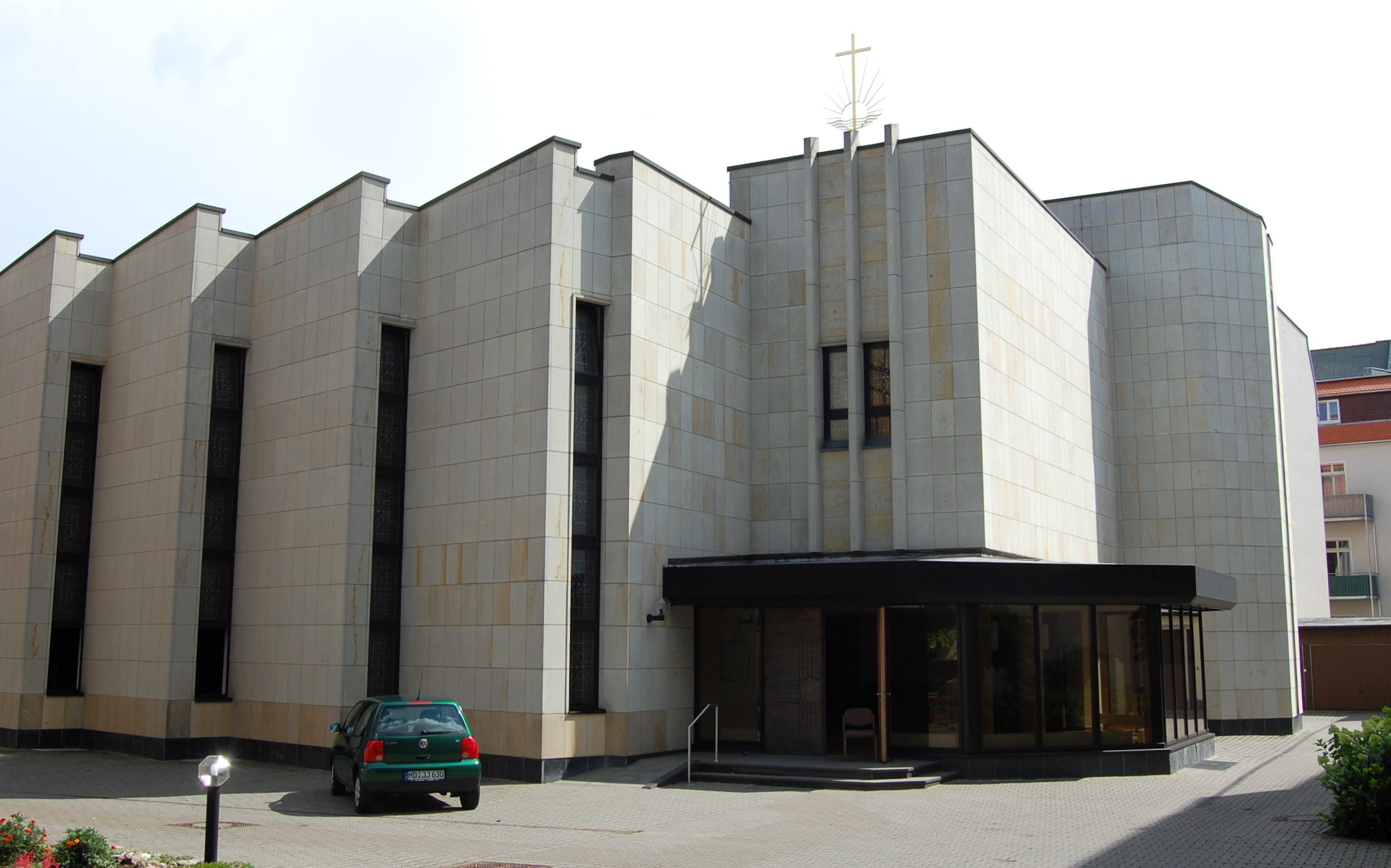 Westseite der neuapostolischen Kirche in Magdeburg-Leipziger Straße